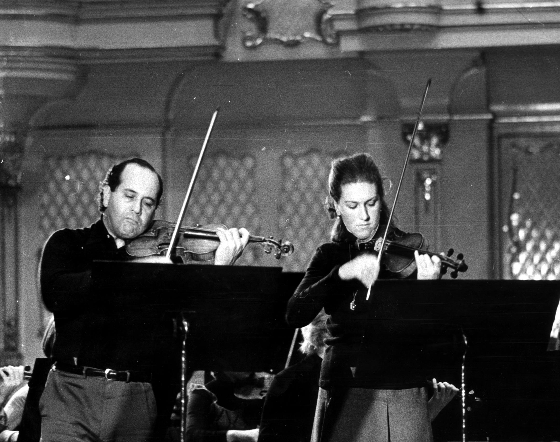 opis: Jela Špitková počas koncertu na BHS 1978 s Igorom Oistrachom Licensing Zdroj: Jela Špitková, osobne Prof. Jela Špitková povoľuje použitie tohto obrázka celosvetovo.